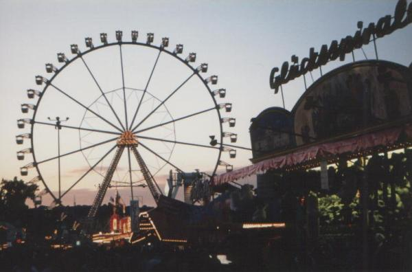 Stuttgarter Volksfest